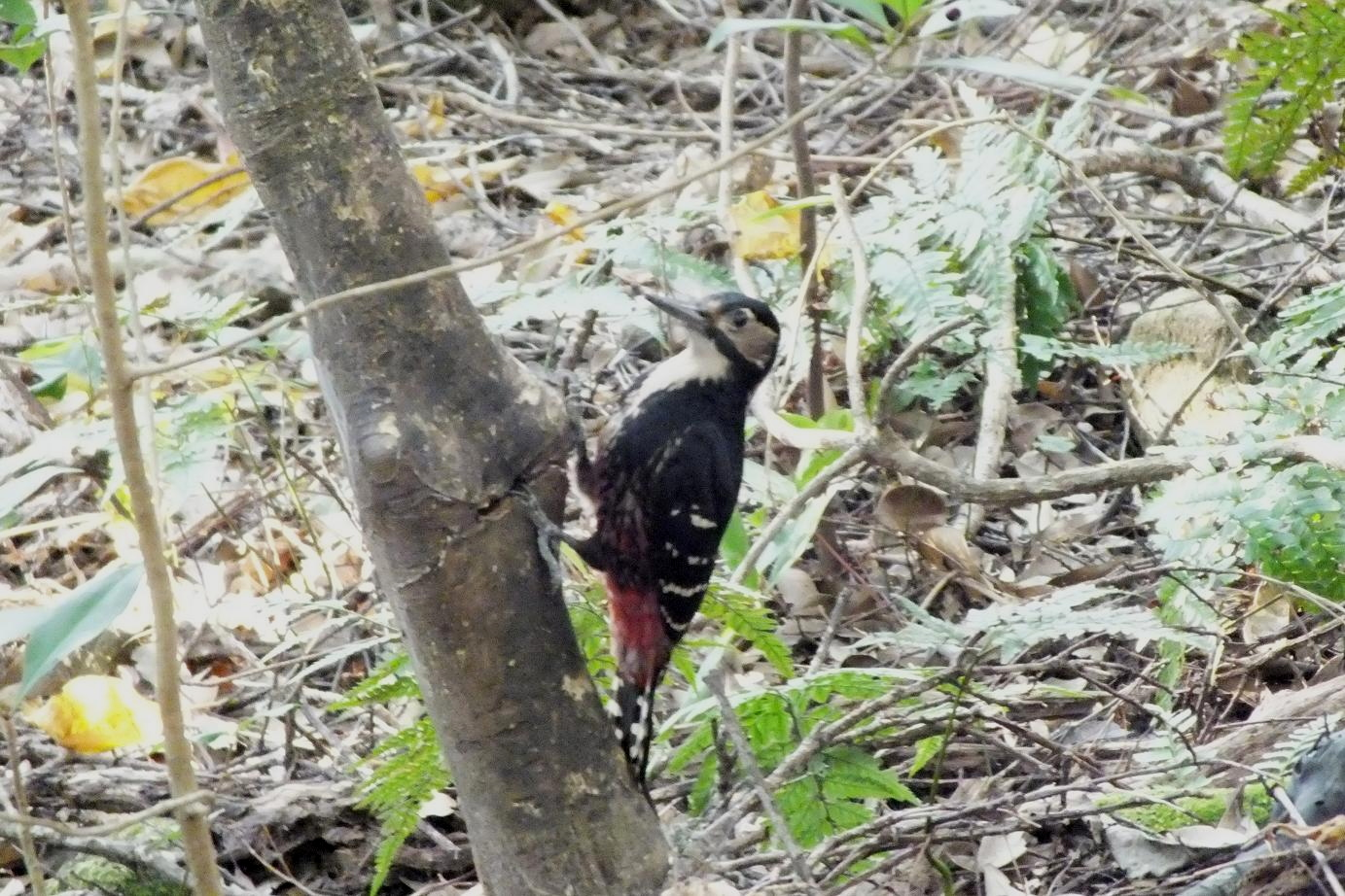 2012年12月7日 奄美大島にて撮影